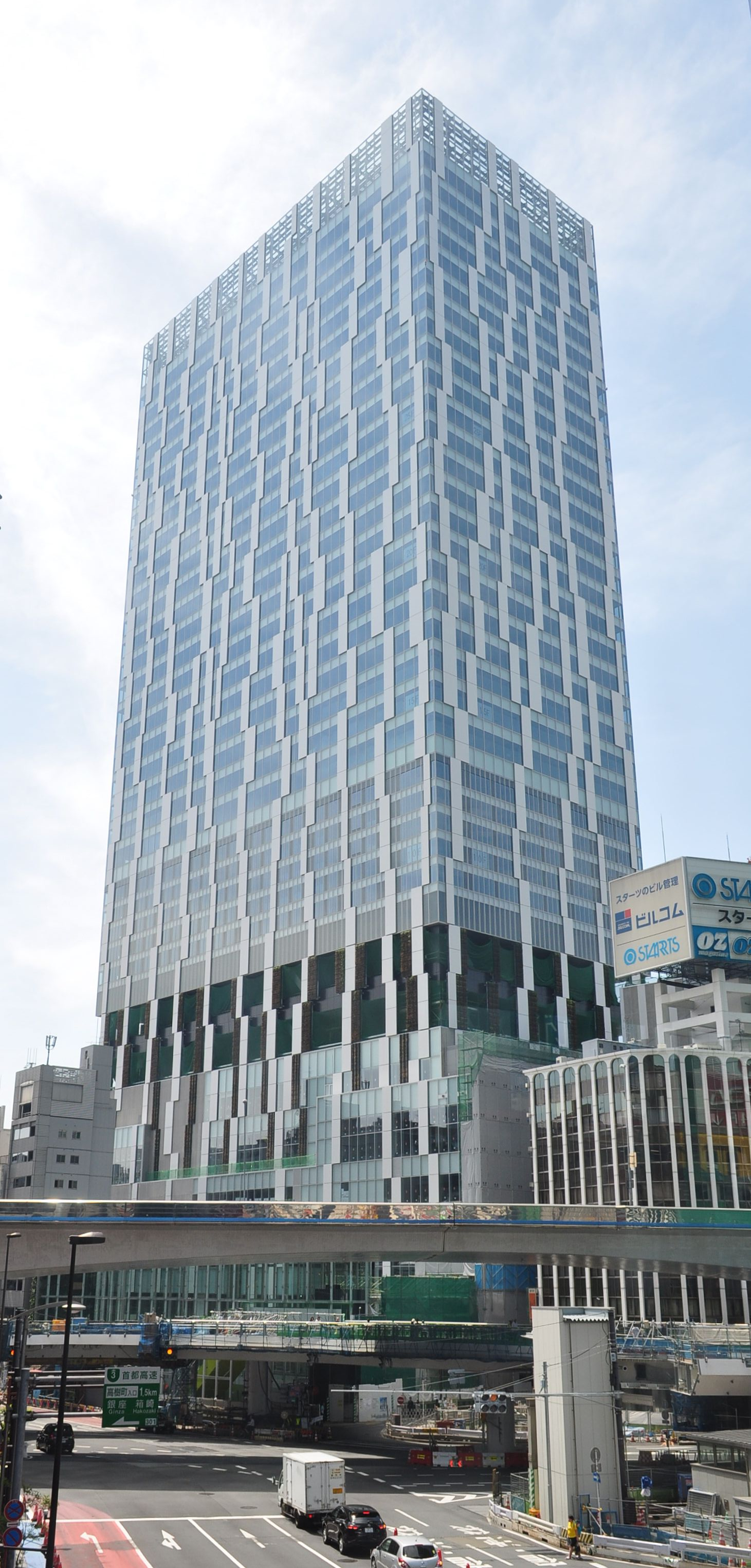 渋谷ストリーム